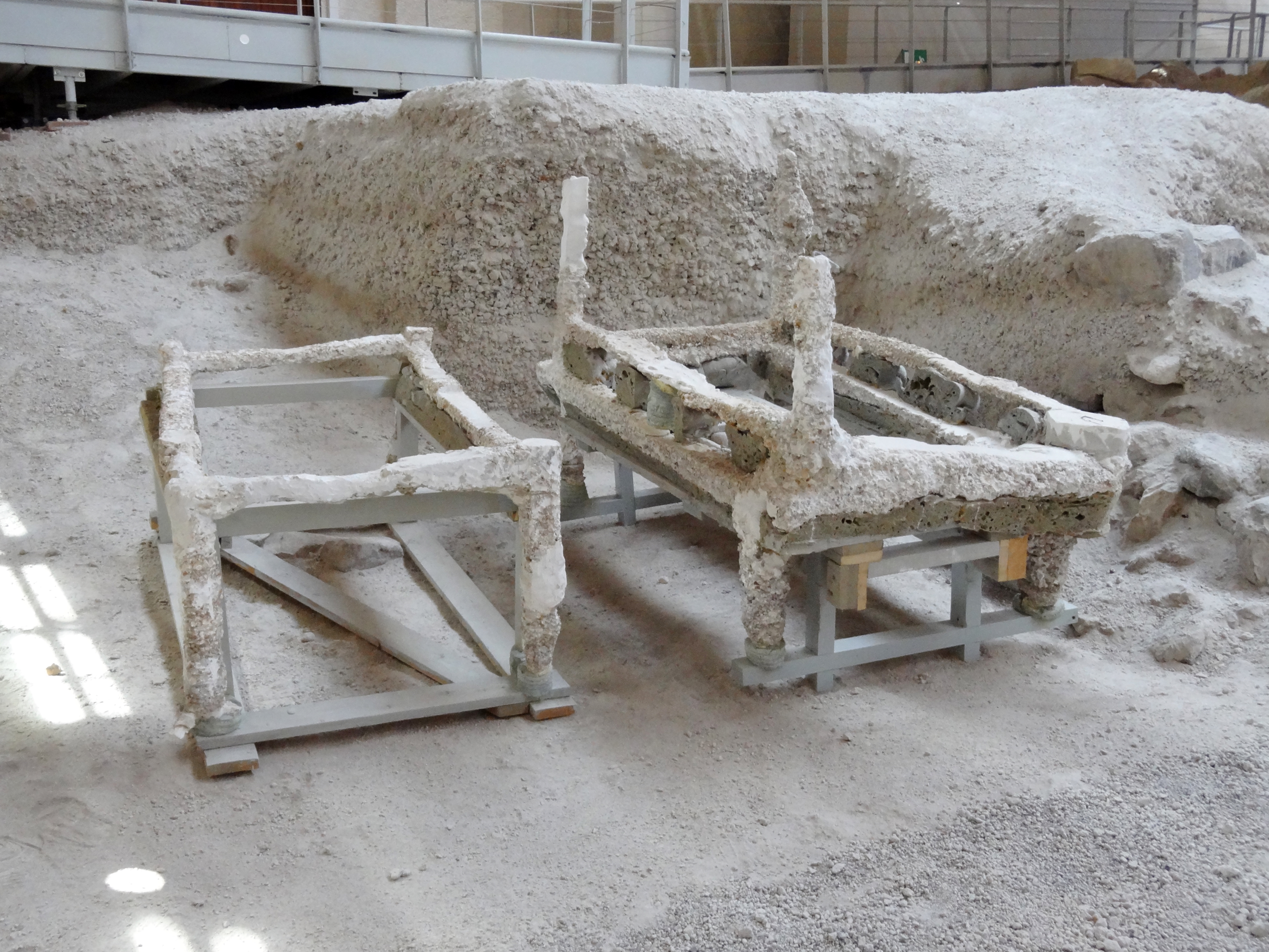 Ausgrabungsstätte von Akrotiri auf Santorin, Kykladen, Griechenland